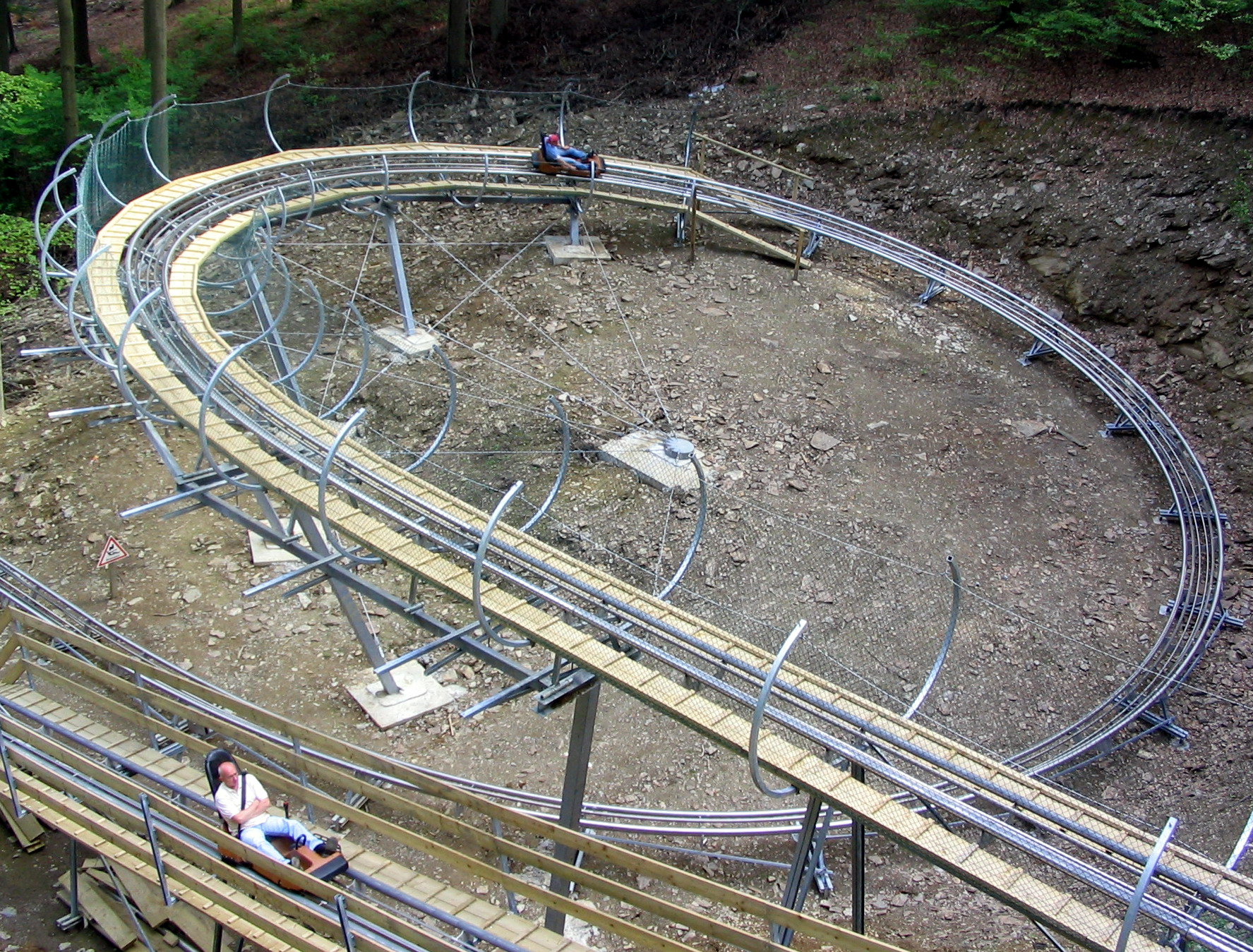 Alpine Coaster Trapper Slider, Fort Fun Abenteuerland, Germany